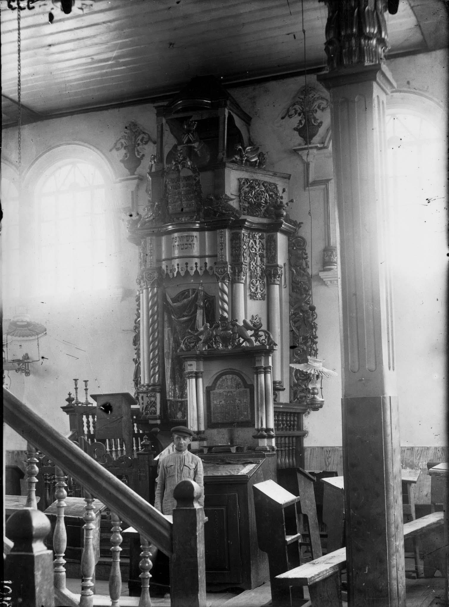 Дерев'яна синагога в Олиці.